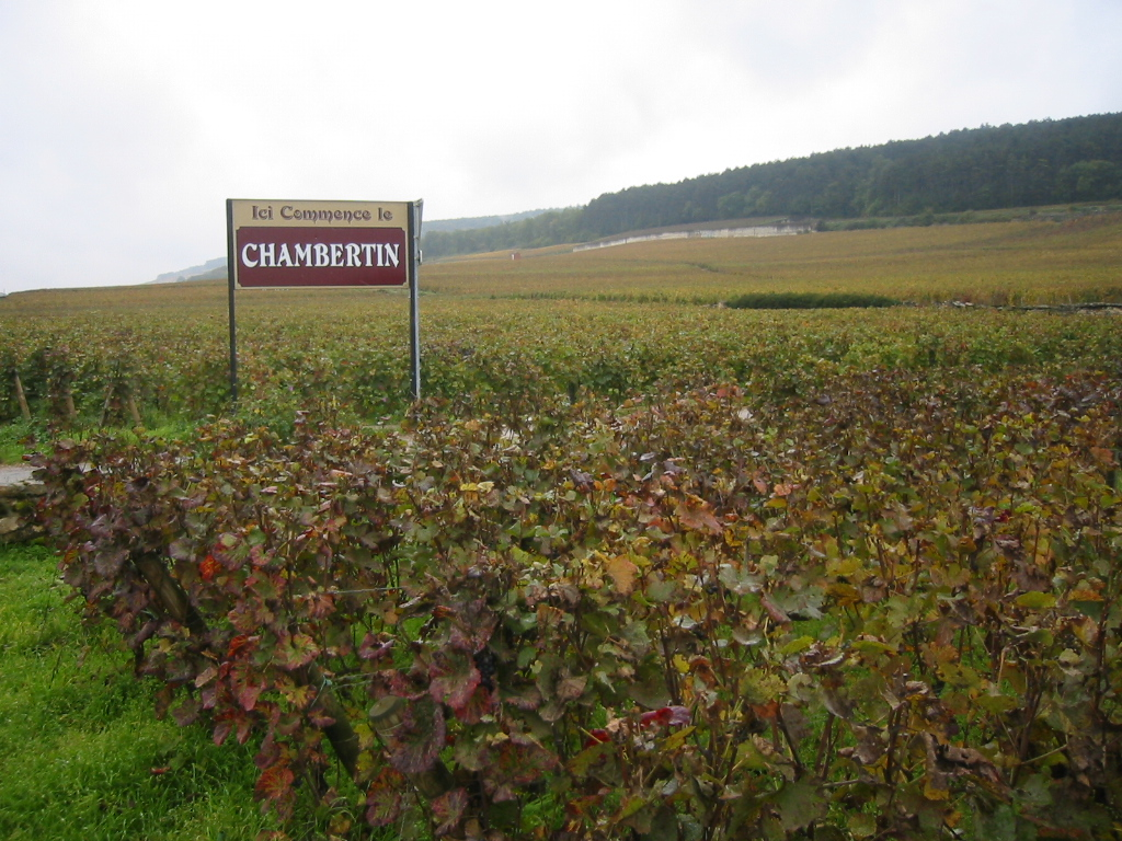 Panneau ici commence le Chambertin du vignoble de Gevrey Chambertin